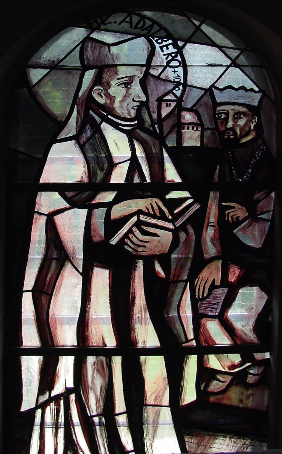 Kirchenfenster in der Pfarrkirche Liesing (Wien 23) von Adalbero. Bild von mir selbst aufgenommen im Sommer 2005.